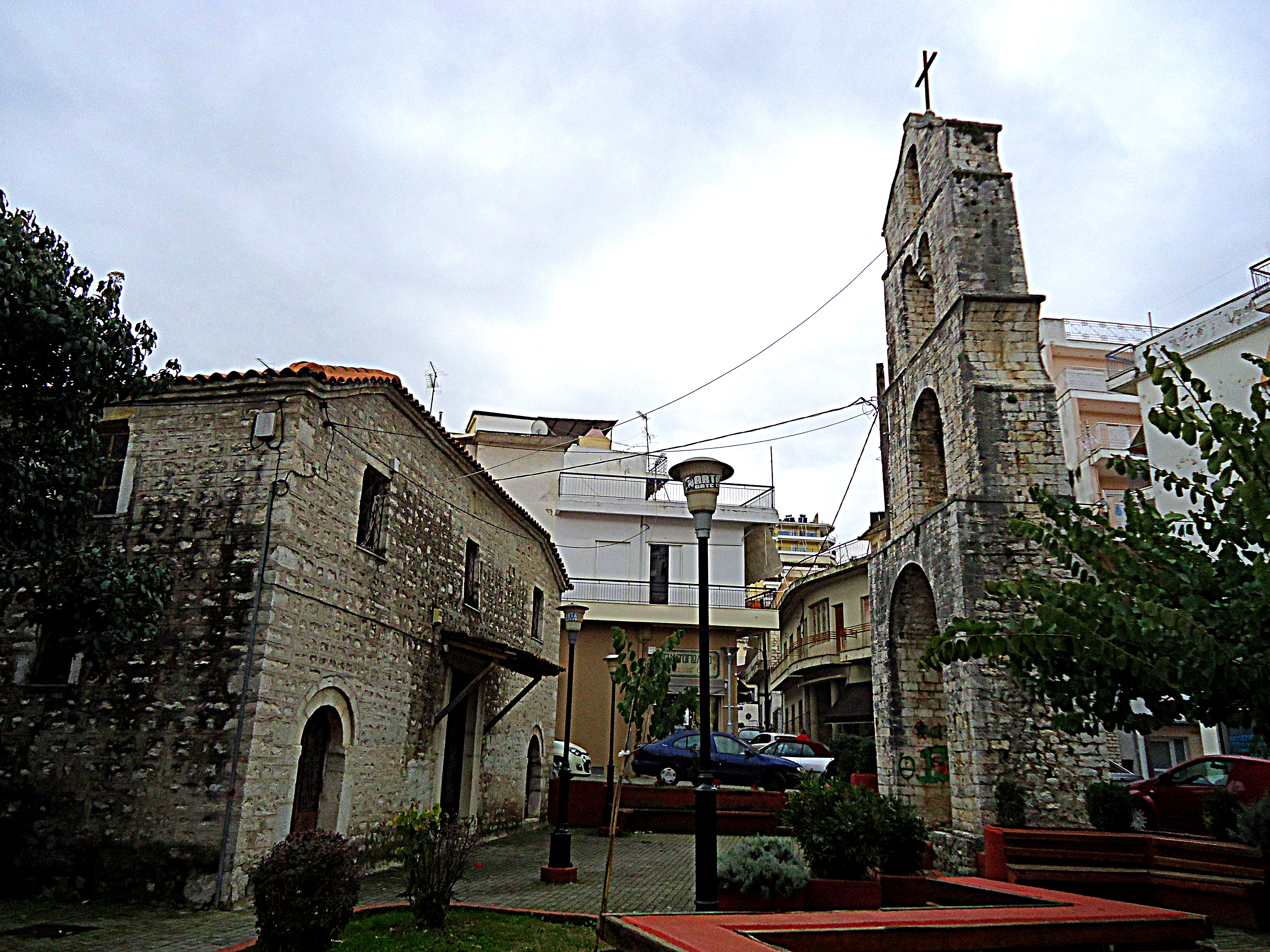 Ο ναός της Αγίας Σοφίας στην Άρτα.Βρίσκεται στο κέντρο της πόλης κοντά στο μητροπολικό ναό του Αγίου Δημητρίου. Είναι μεγάλη τρίκλιτη ξυλόστεγη βασιλική με ξεχωριστό καμπαναριό.Κτίστηκε το 1812.